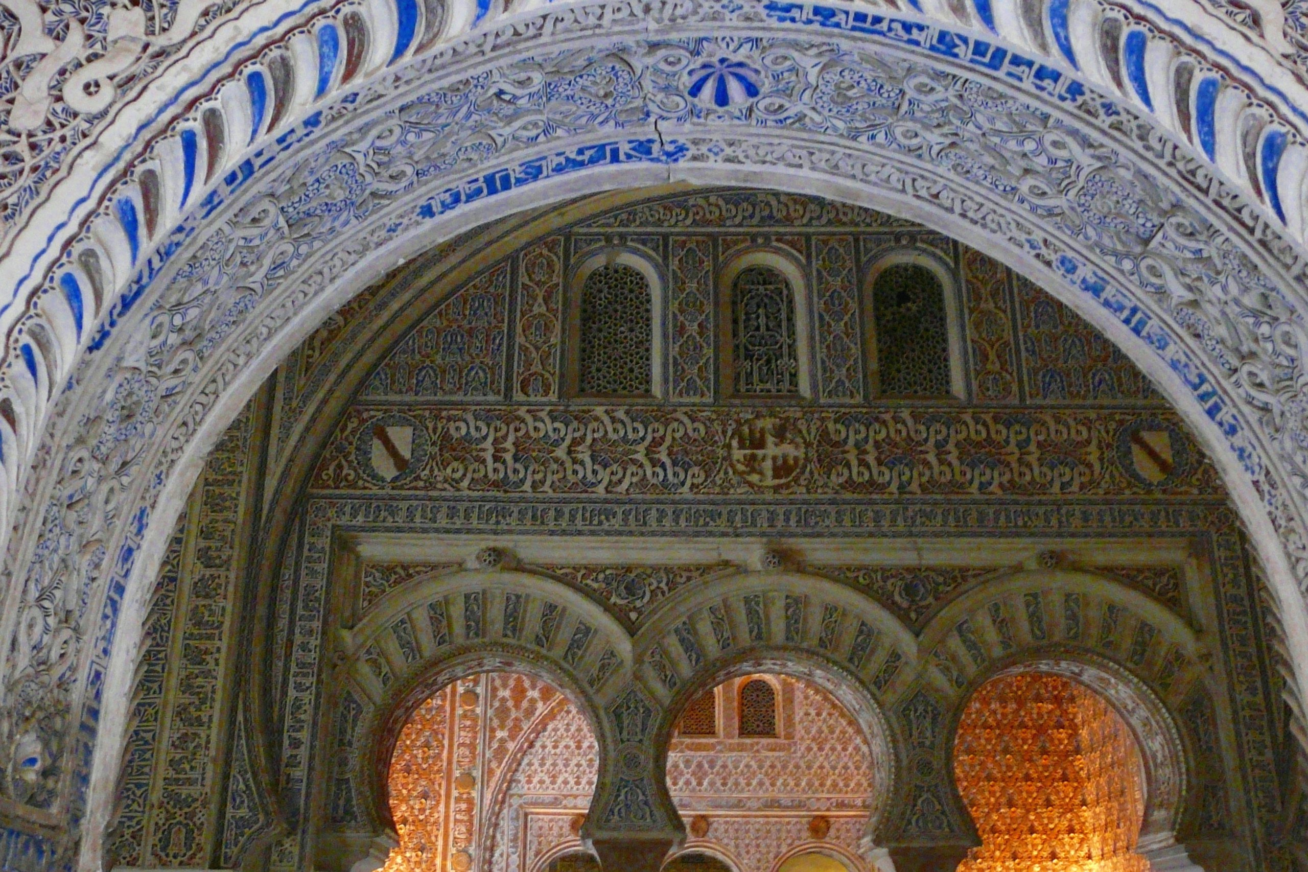 palais royal de Séville